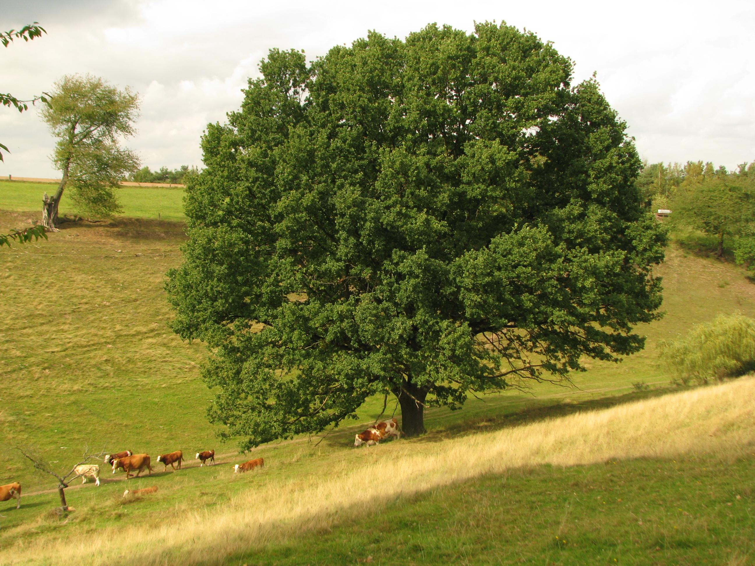 Huteeiche südwestlich von Oberellen (Thüringen).